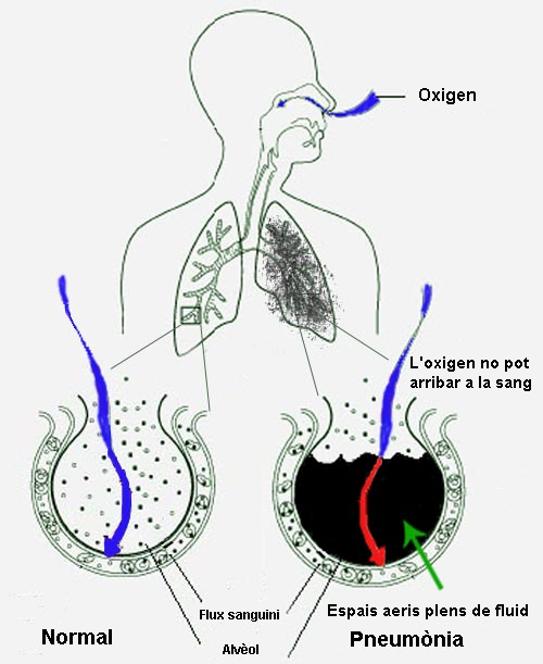 Explicació de la pneumònia